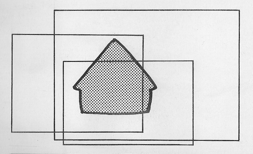 cadrages de la Meule de Monet